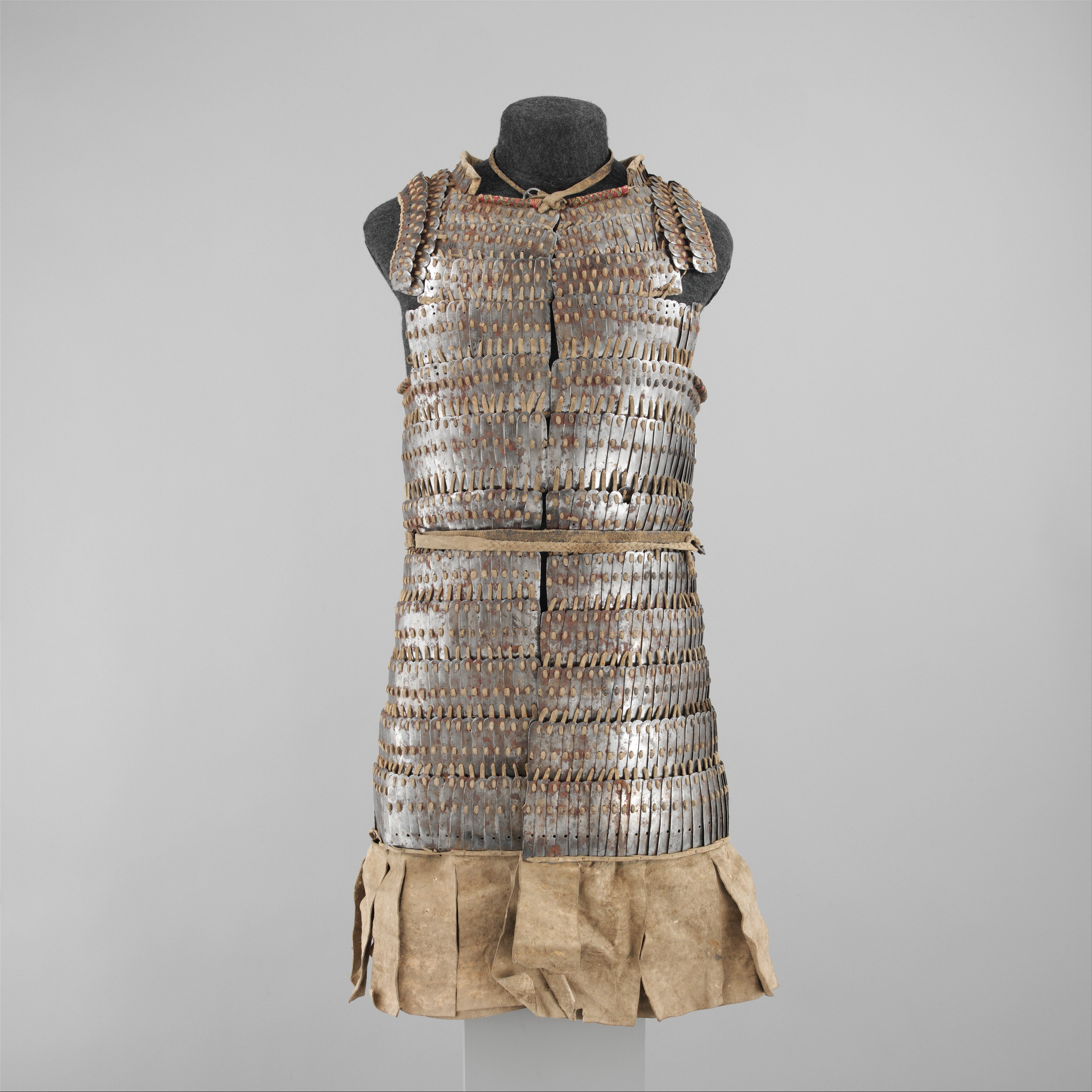 Tibetan; Lamellar armor (byang bu'i khrab); Armor for Man